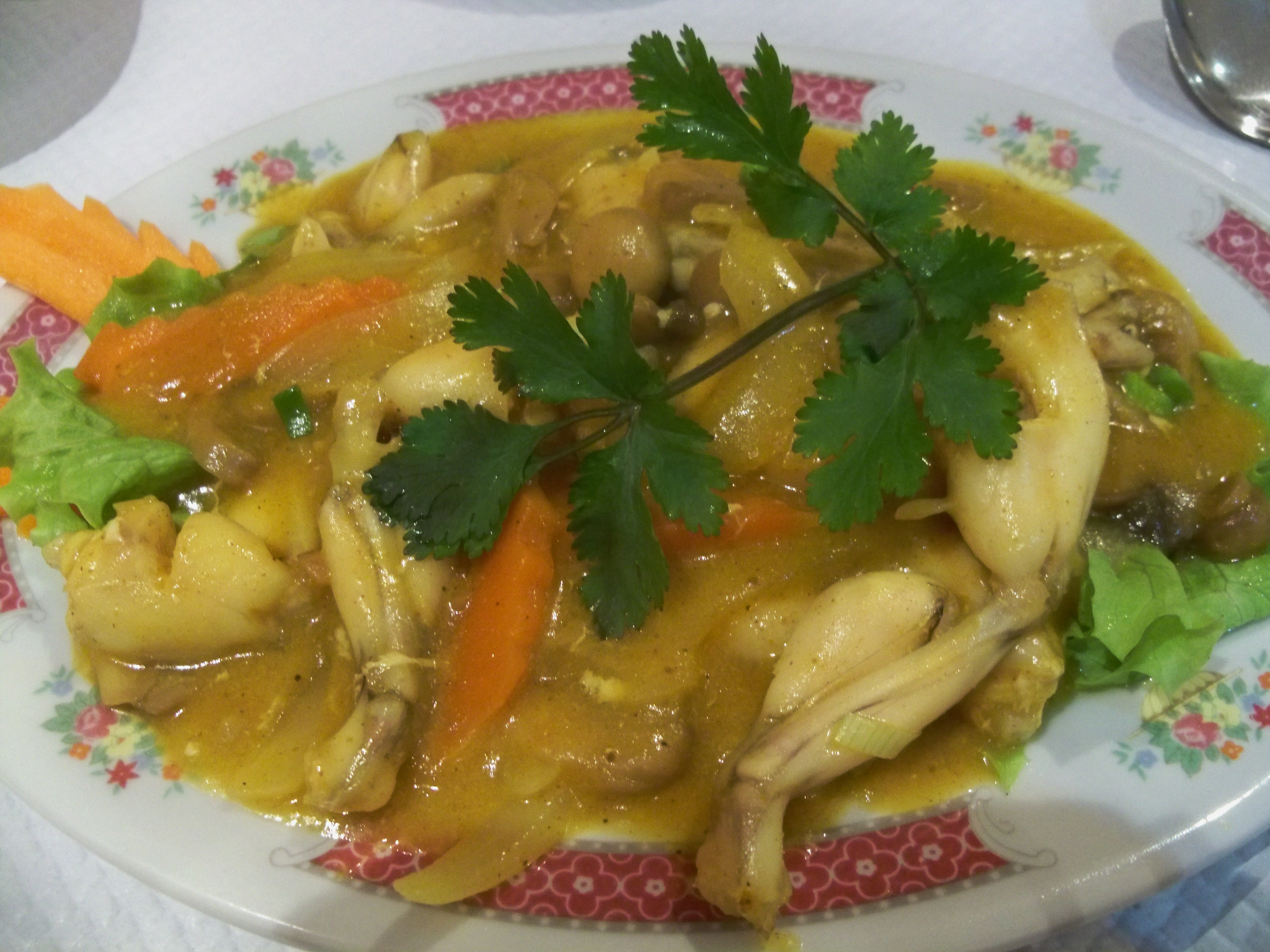 Plat asiatique de cuisses de grenouilles au cury